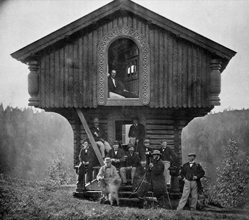 Thomas Heftye mfl og loft på Sarabråten, loft, gruppe, menn, geværer, hund, jakt.